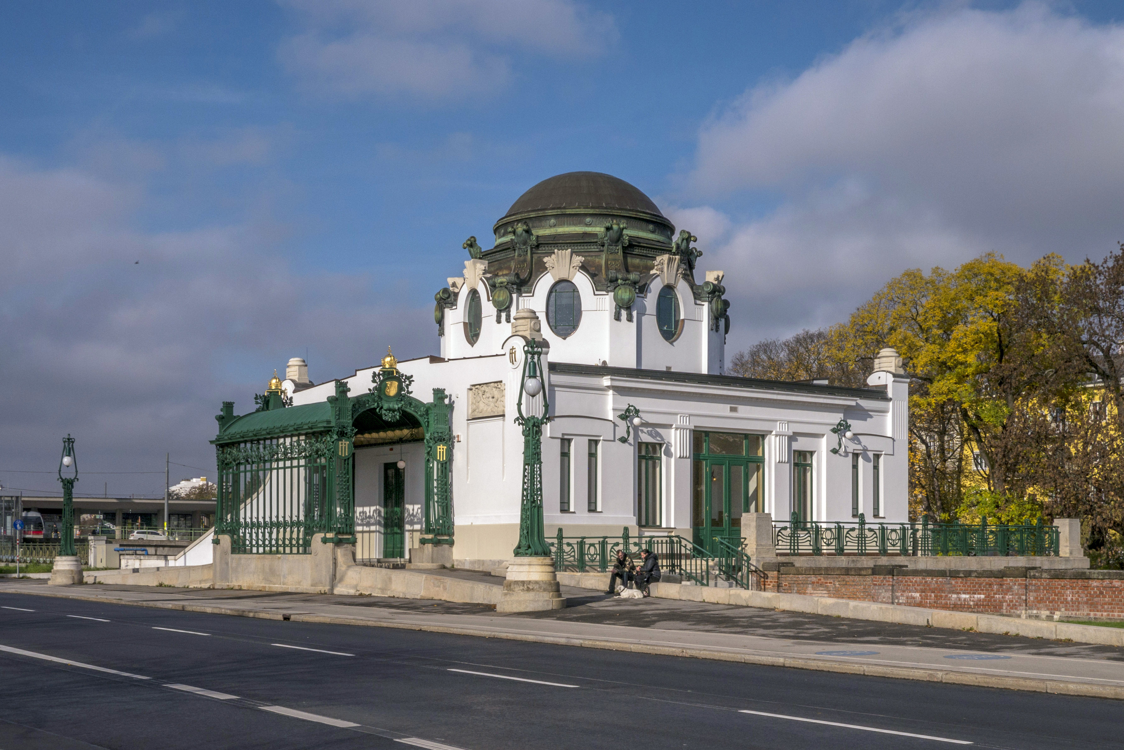 Ehem. Hofpavillon Schönbrunn, Kaiserpavillon